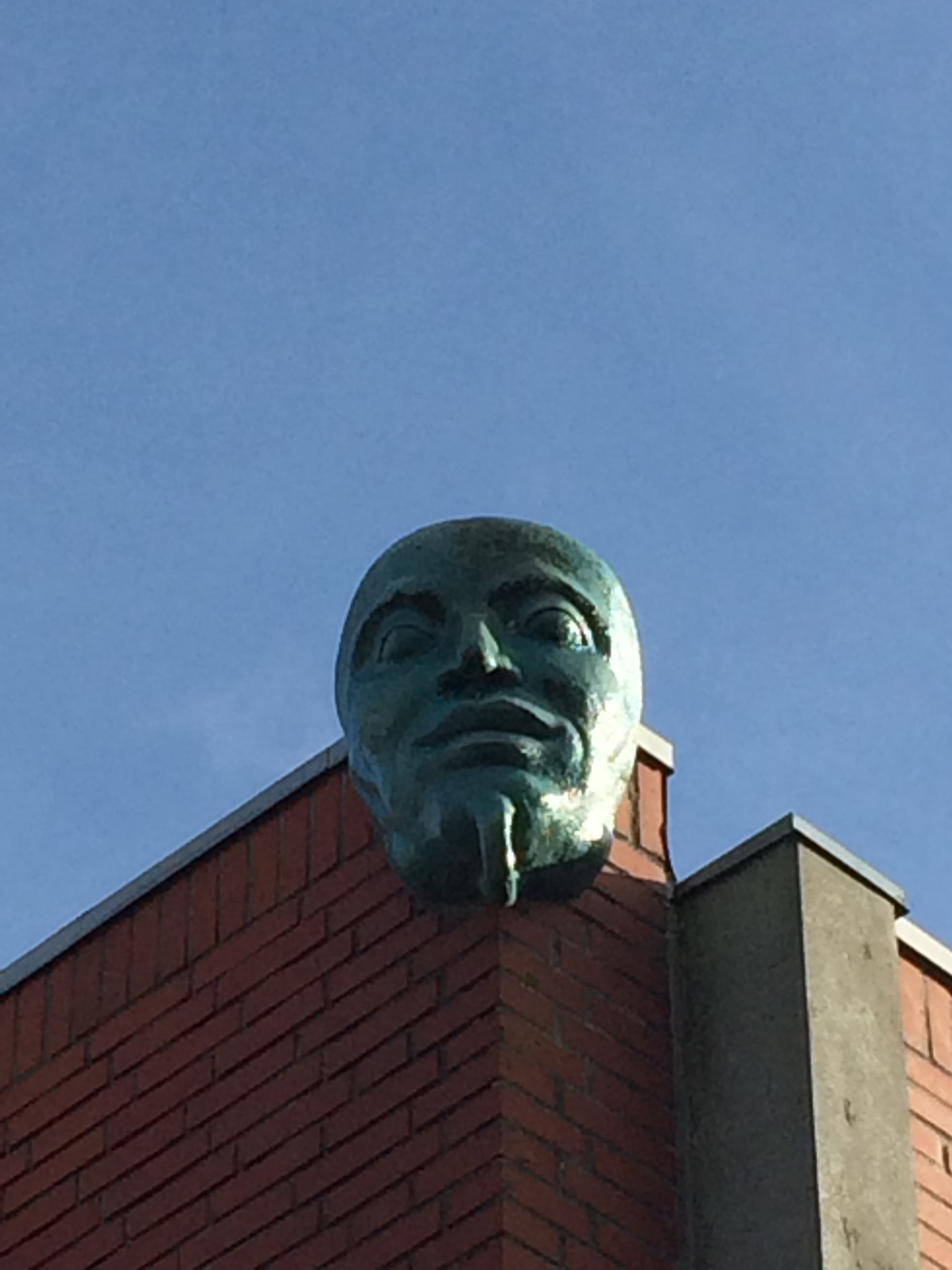 Fantasy head facing northwest on Tallerup school sports gym